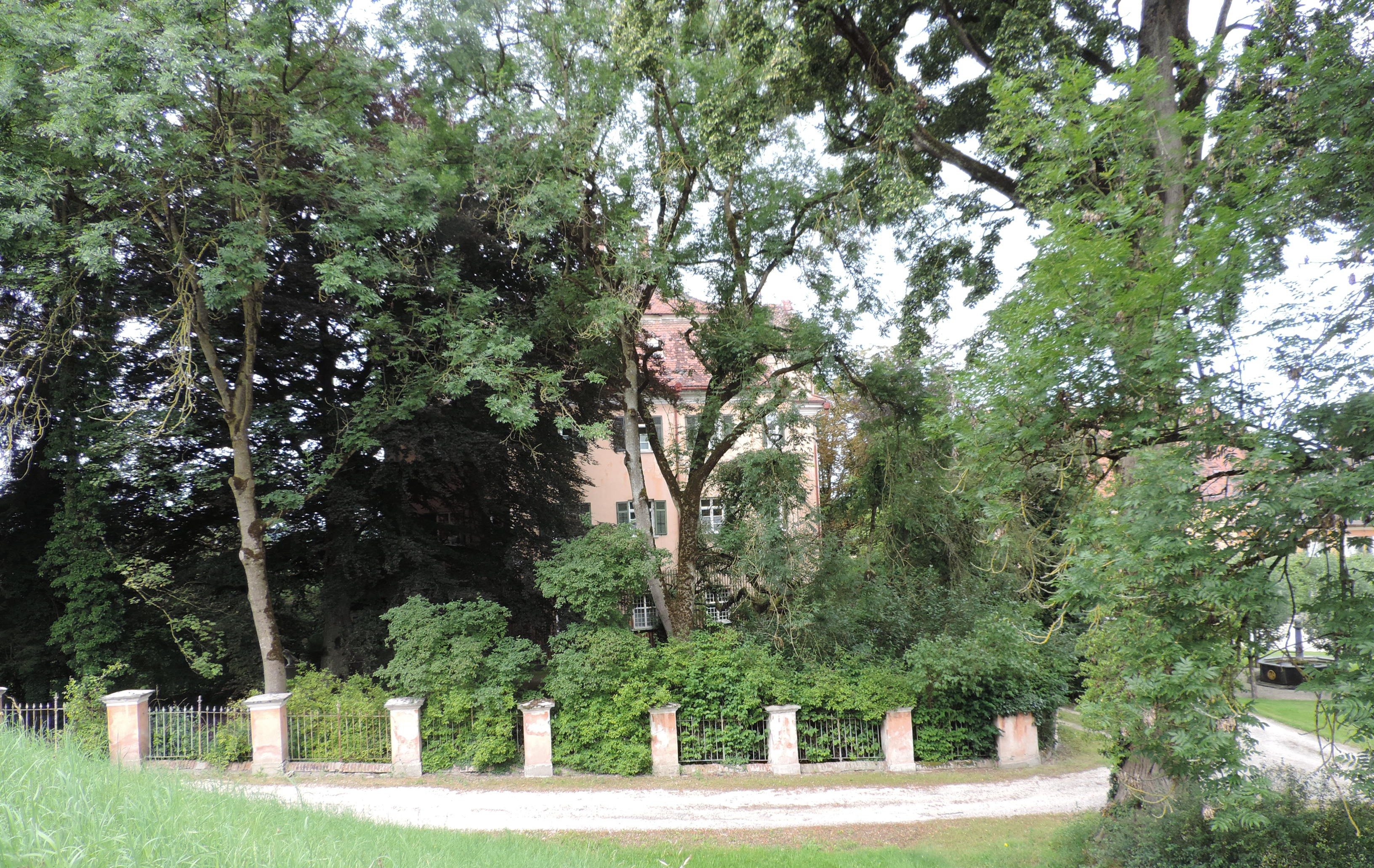 Schloss Burtenbach